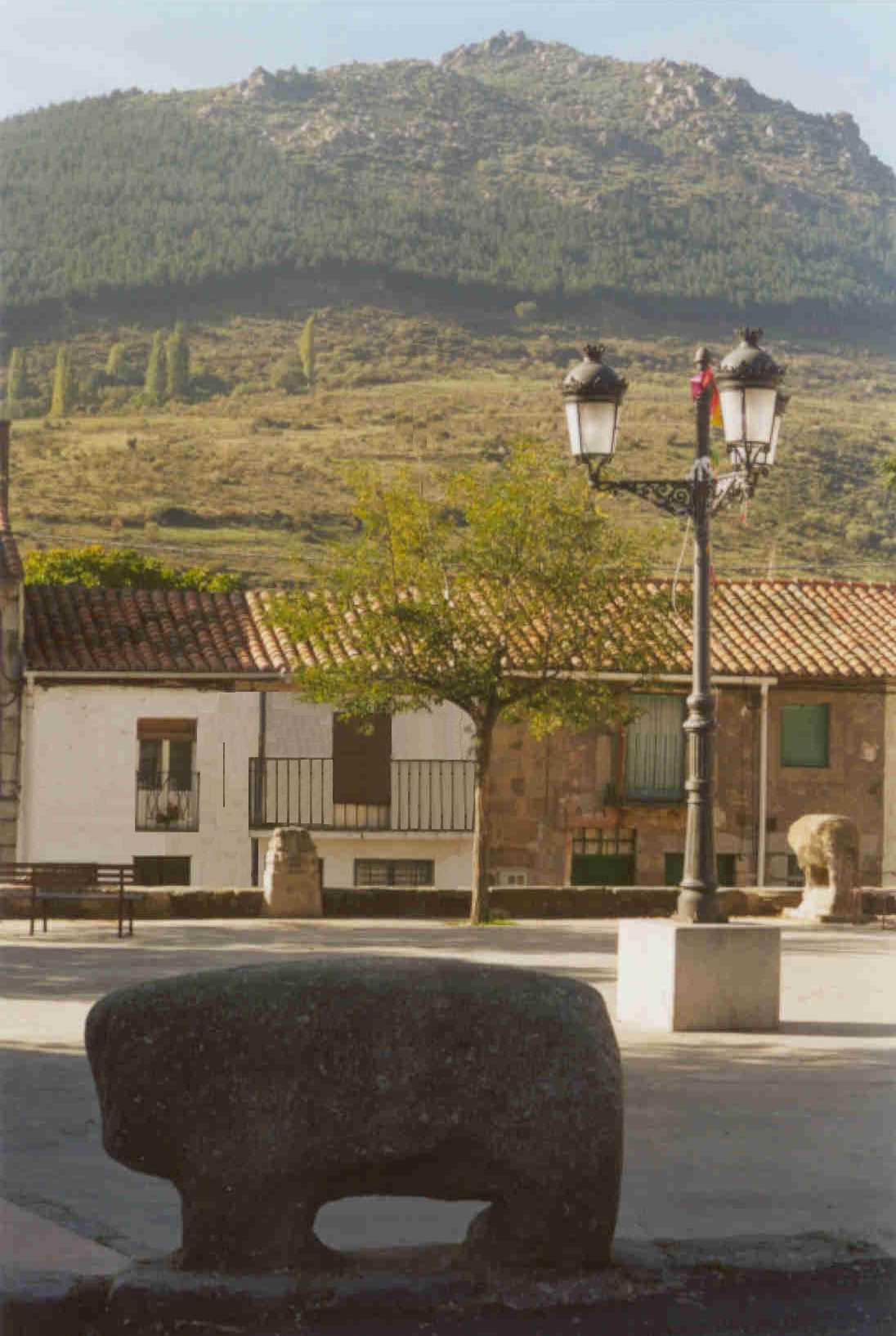 VILLATORO (AVILA, ESPAÑA)